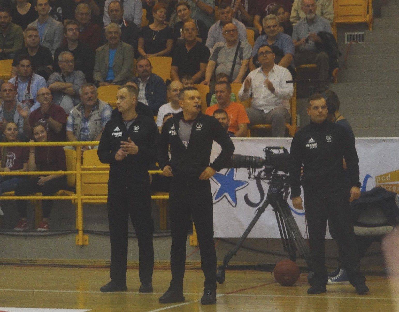 Sędziowie meczu Spójnia - King (06.10.2018)